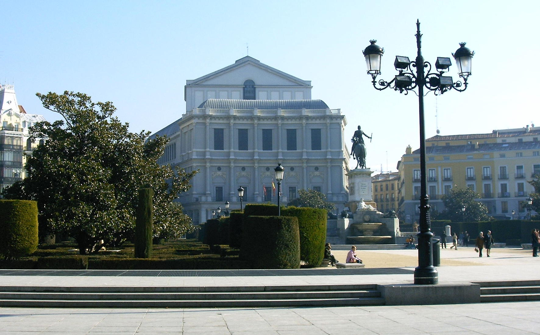 Teatro Real y Plaza de Oriente Año 2005 Autor: Beatriz M.R.